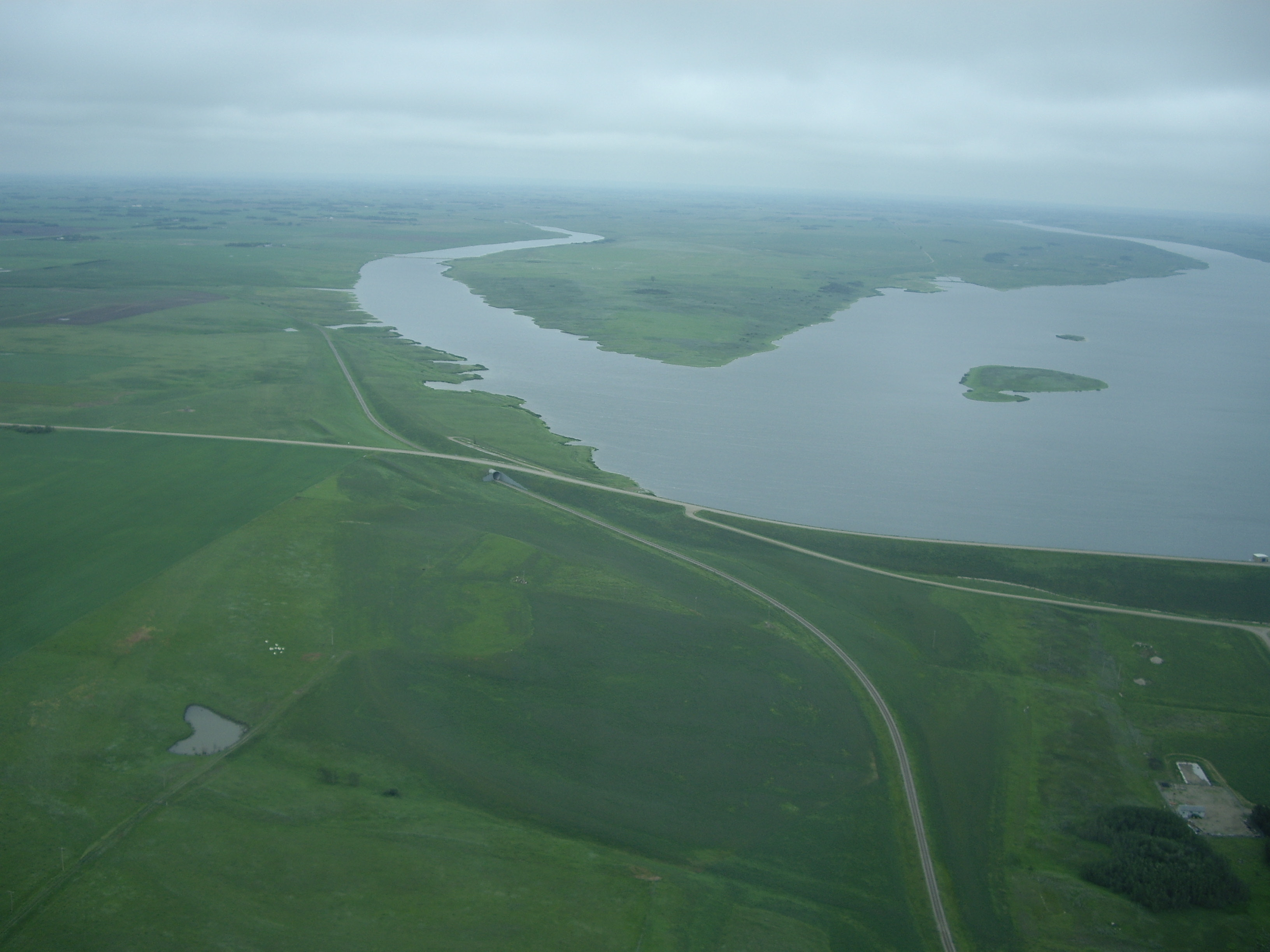 Alameda Reservoir / Alameda Dam Estevan, Saskatchewan